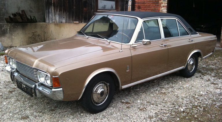 Ford 26m Baujahr 06/1970 mit Vollausstattung und Top Originalzustand